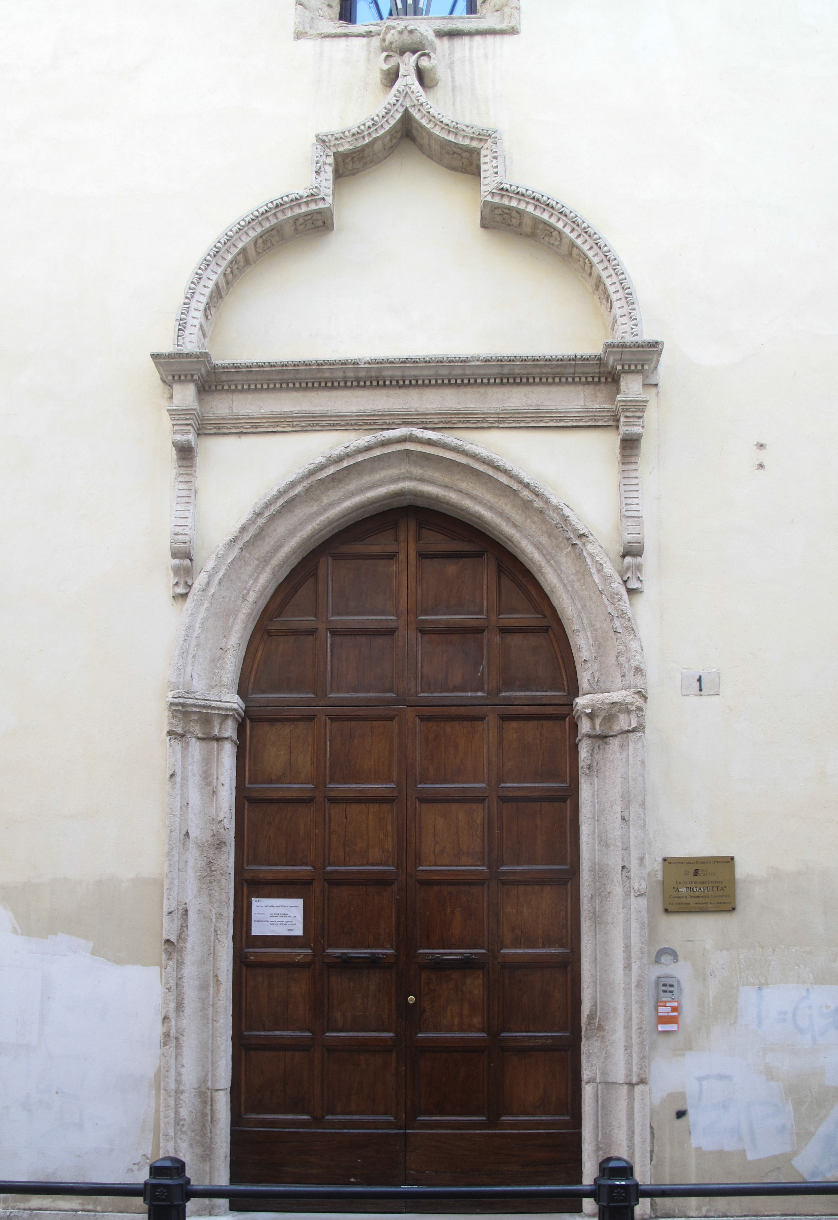 Ospedale di Santa Maria e Cristoforo (San Marcello) - portale